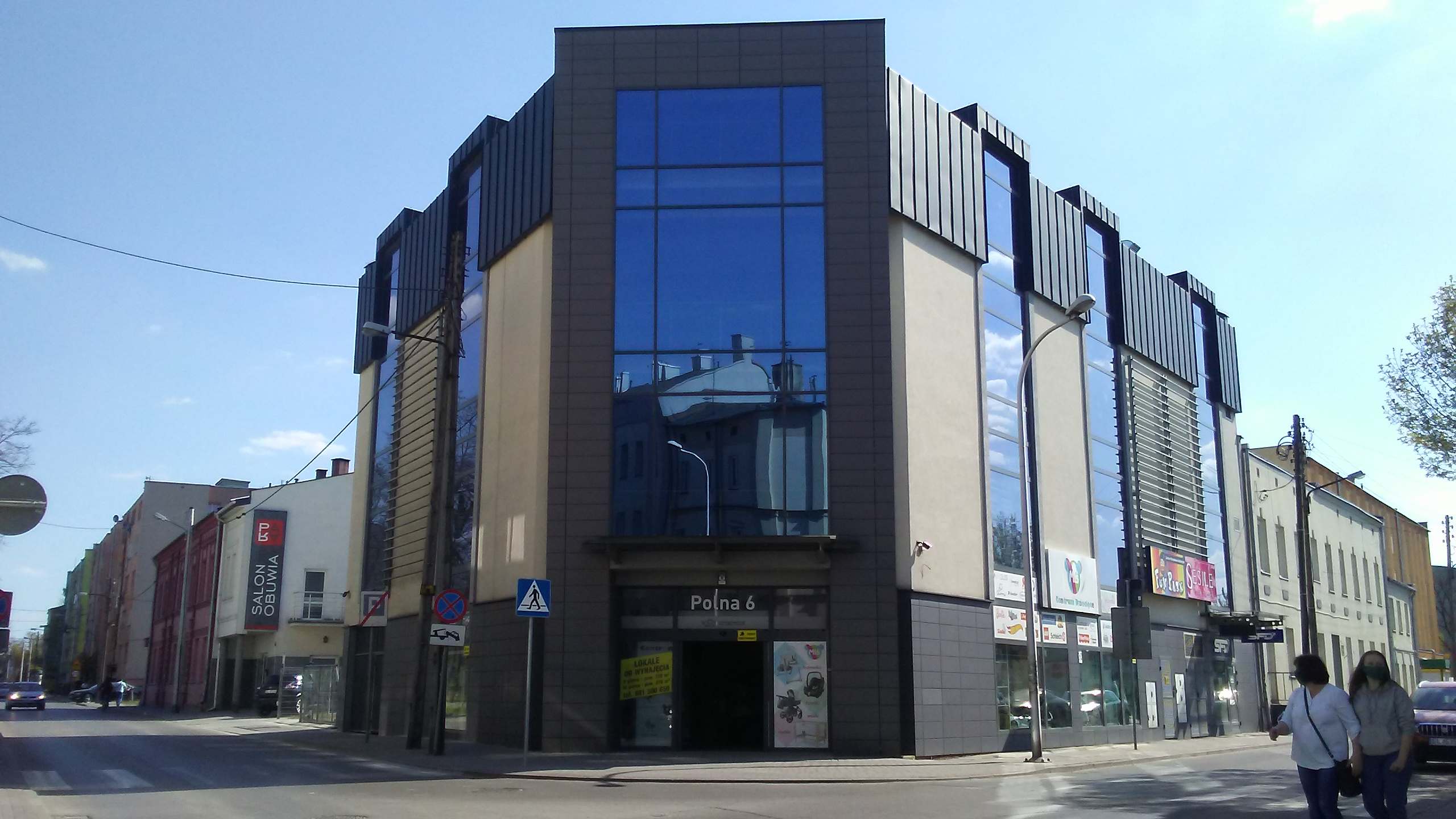 Dom handlowy Polna 6, Tomaszów Mazowiecki